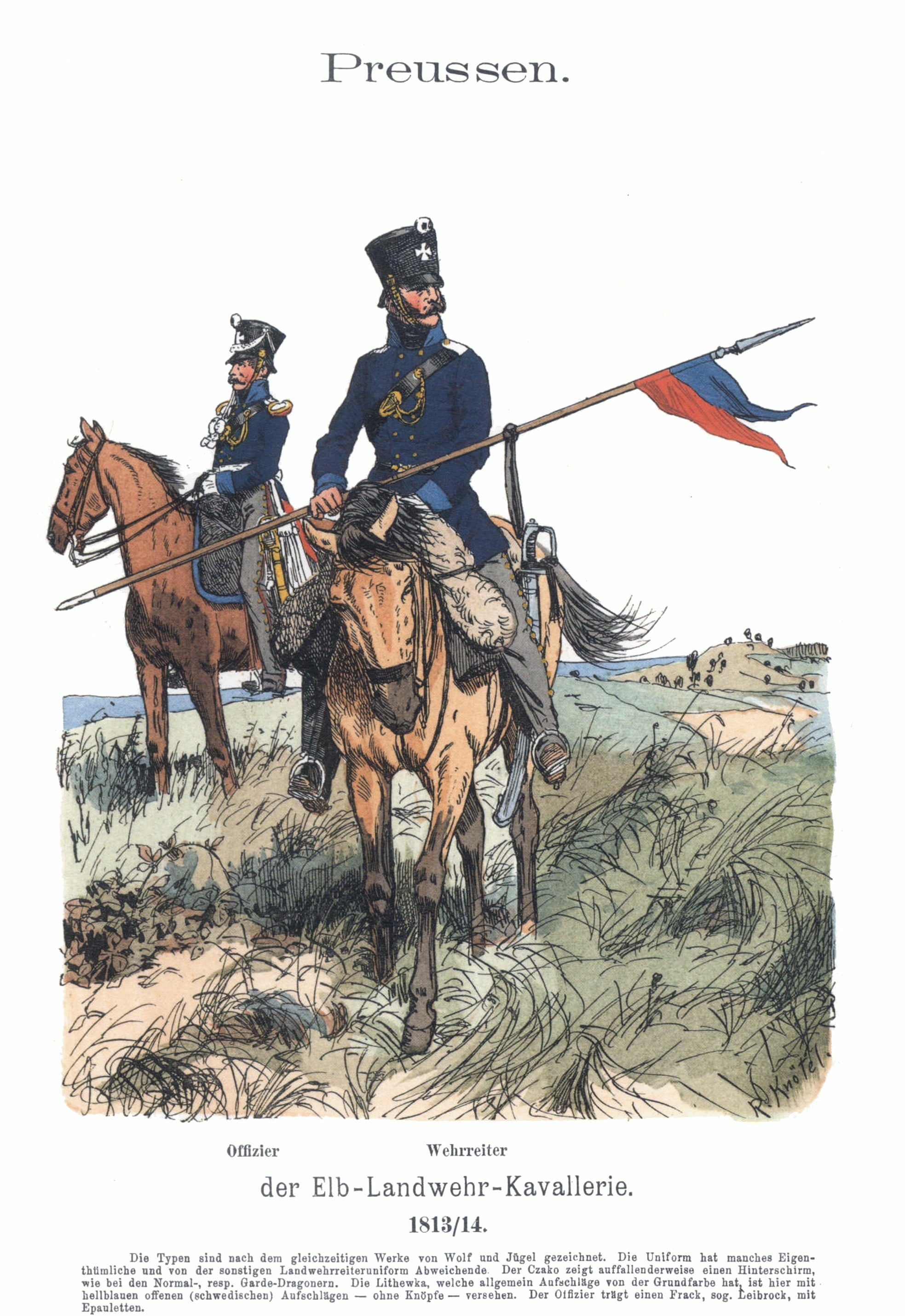 Иллюстрация Рихарда Кнотеля